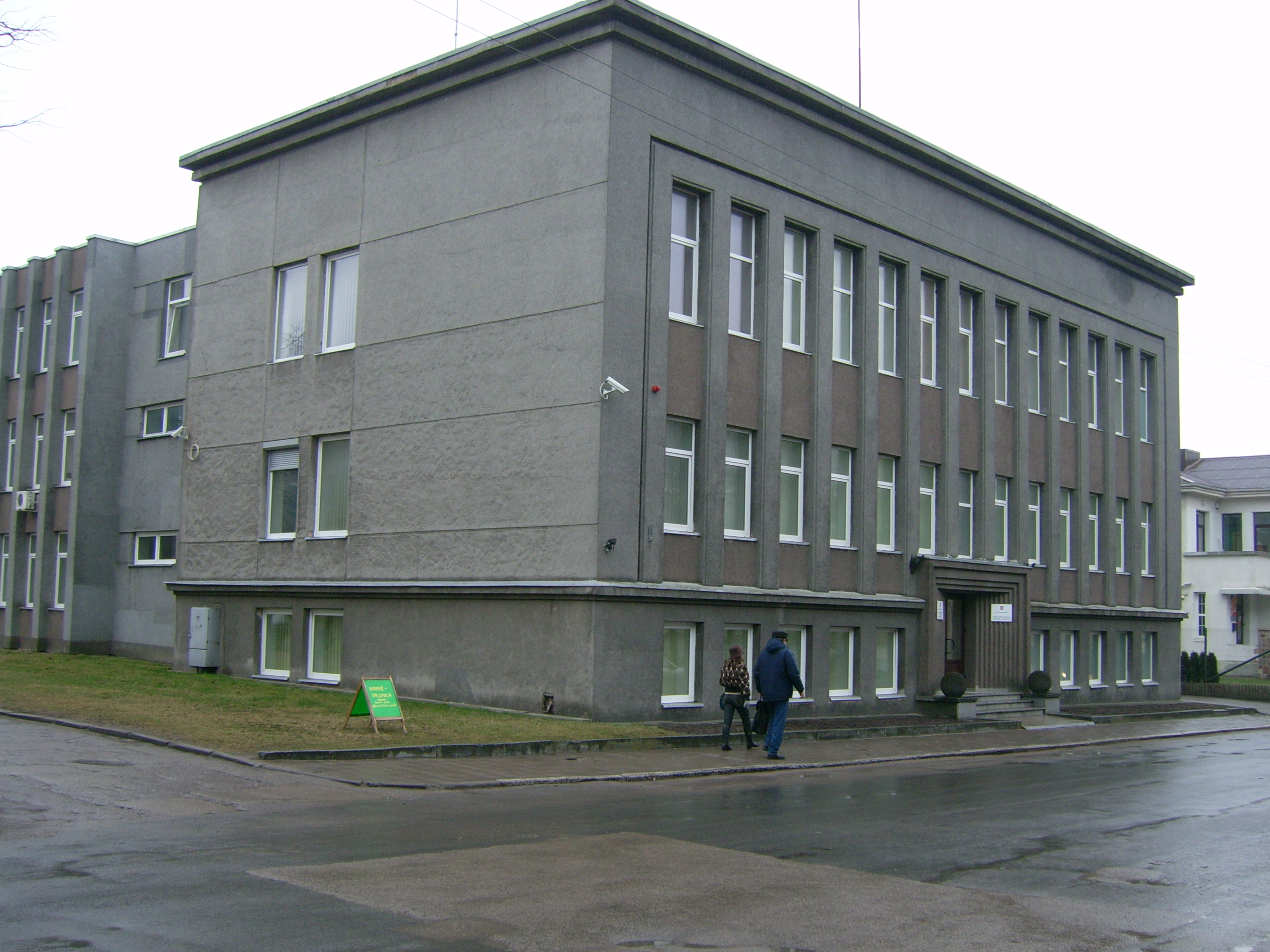 Tauragės apskrities vadovybė